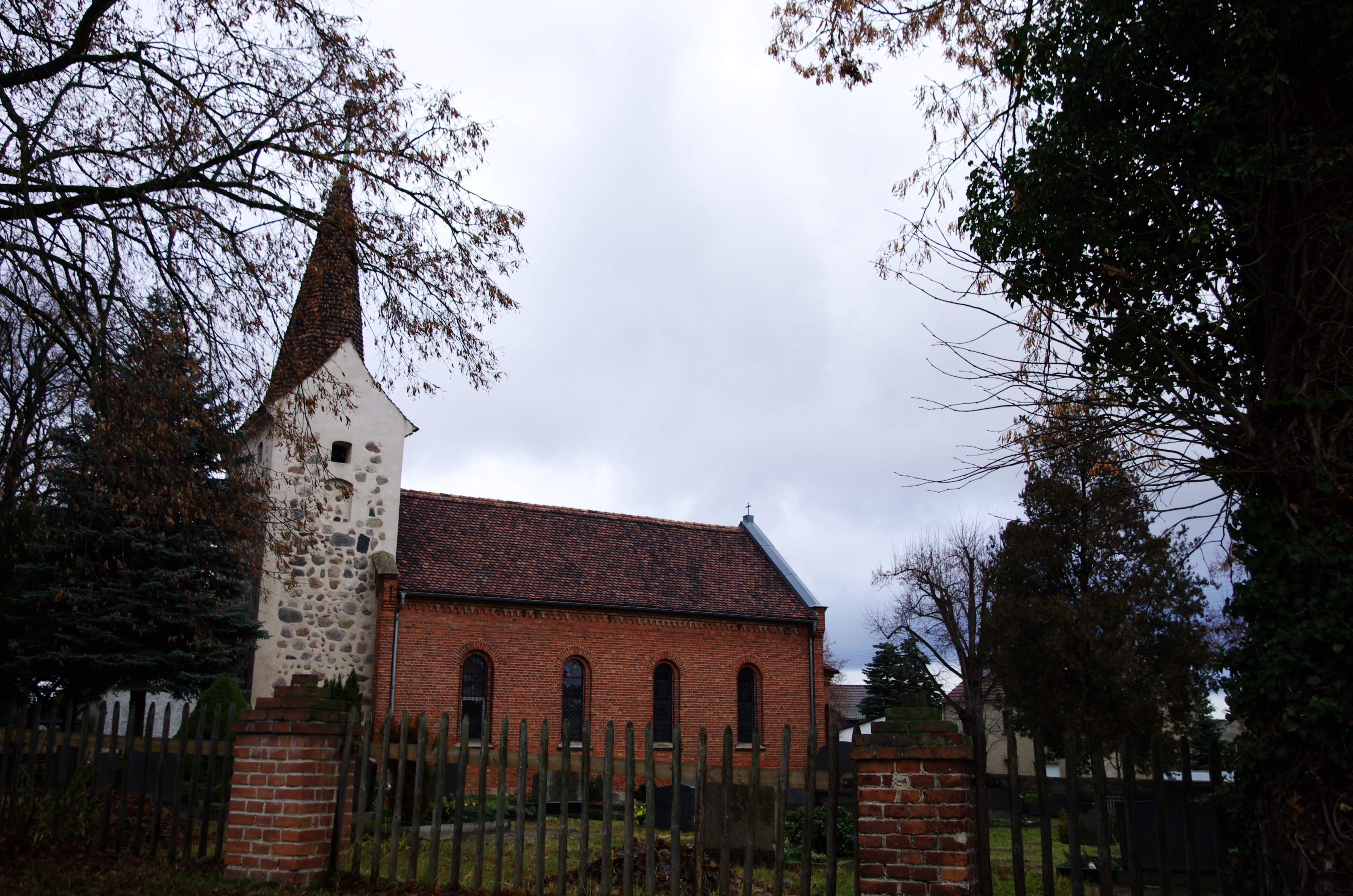 Brandenburg (Havel) Ortsteil Göttin. Die Kirche steht unter Denkmalschutz.